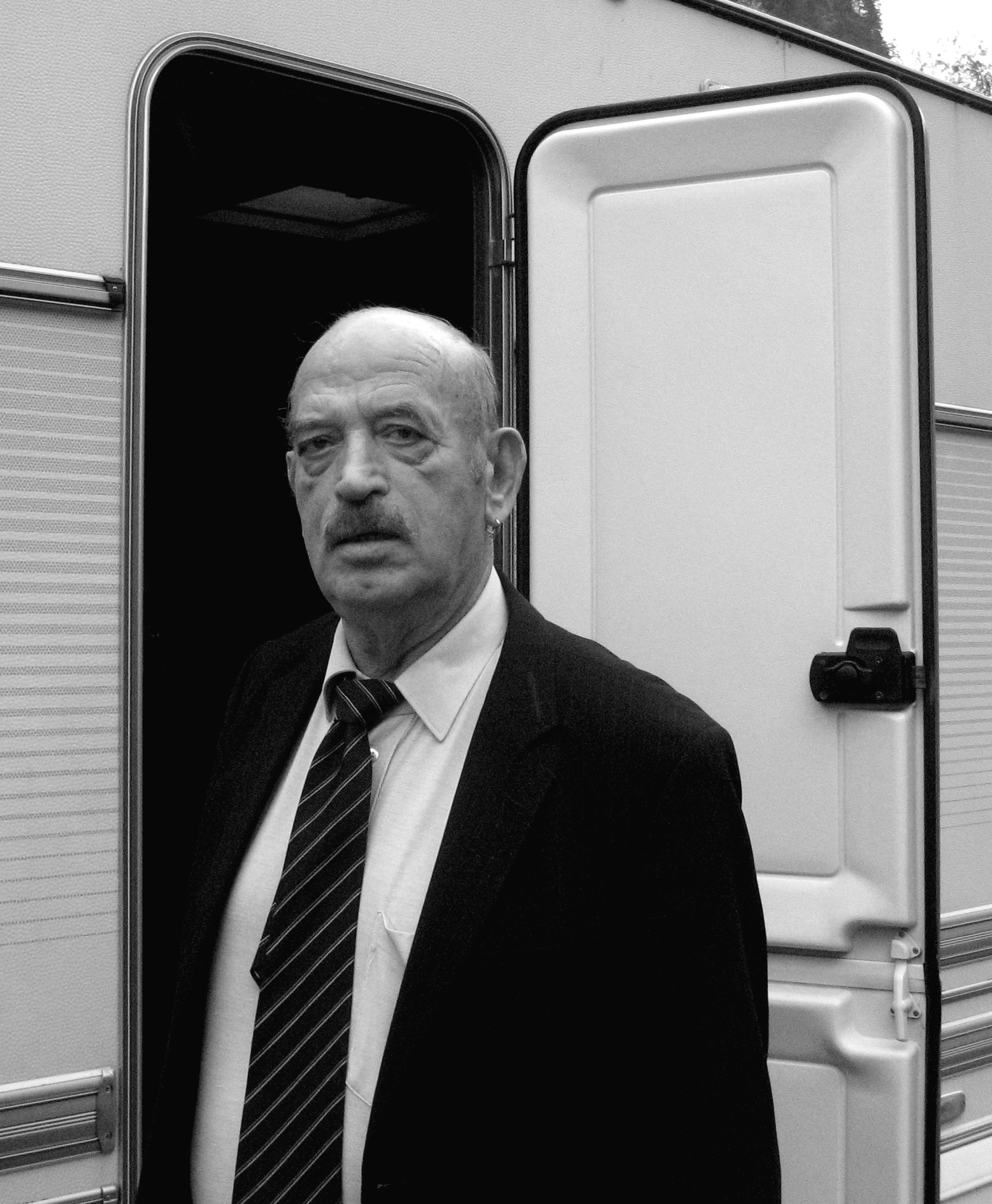 Porträt Robert Huber, Präsident der Radgenossenschaft der Landstrasse, vor seinem Wohnwagen in Graubünden